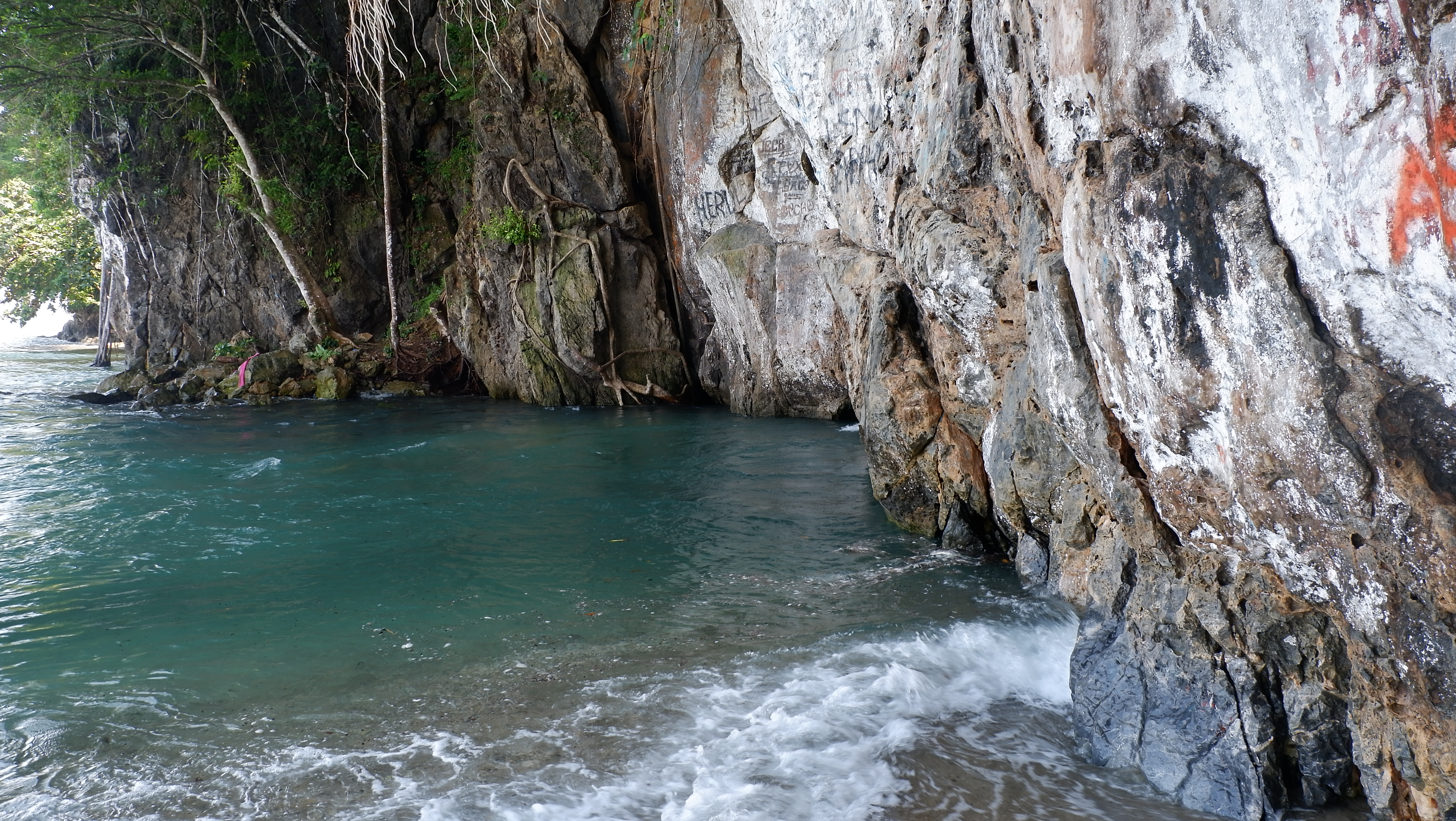 Mata air Sungai Tamborasi berasal dari gua bawah tanah dan langsung mengalir ke laut. Aliran sungai sulit terlihat saat air laut pasang yang tampak pada saat foto ini diambil.